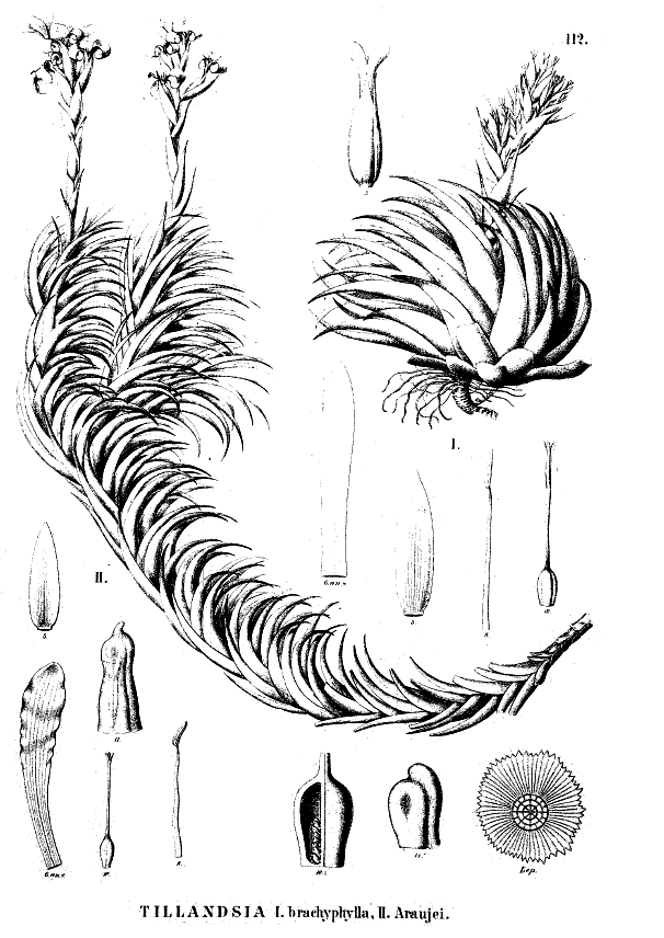 Martius, Fl. Bras. : tab. 112